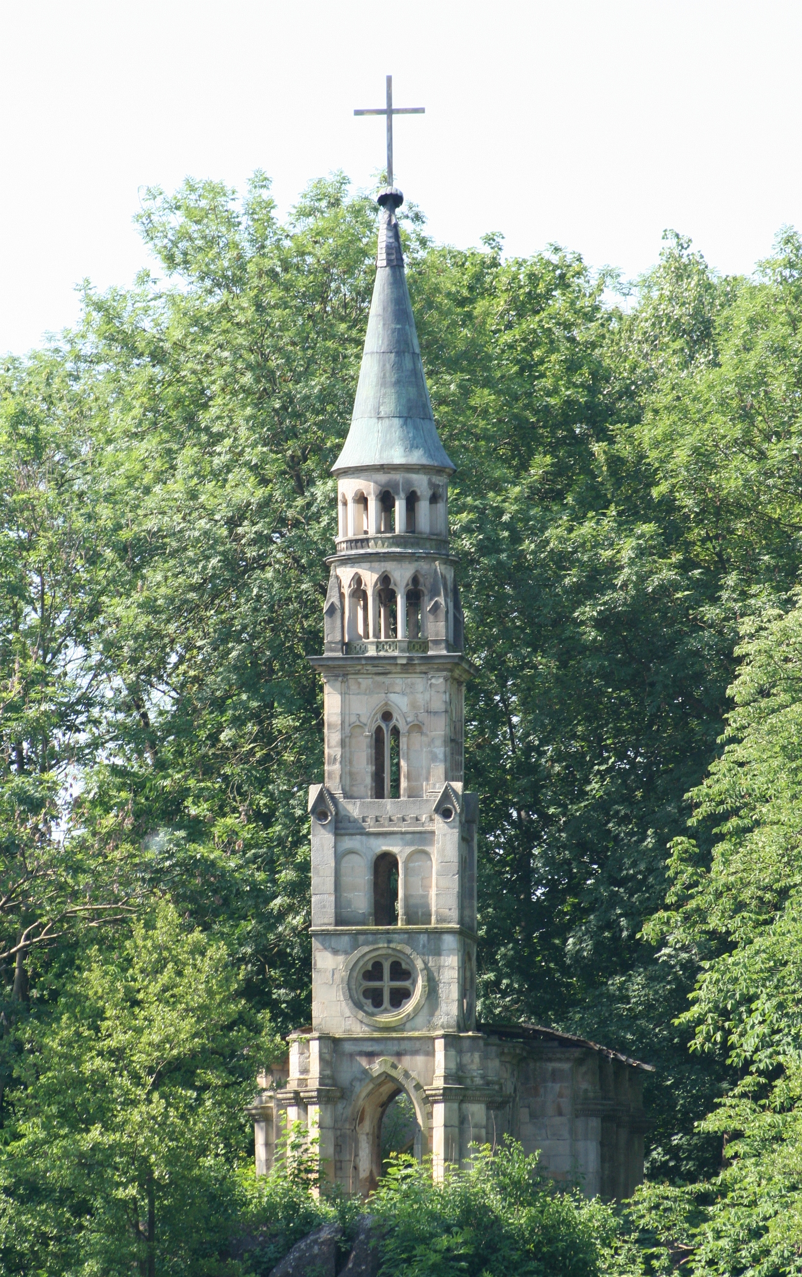 Kirchenruine auf Insel im Schlosspark des Schlosses Monrepos in Ludwigsburg. Denkmalliste für Ludwigsburg nicht verfügbar.